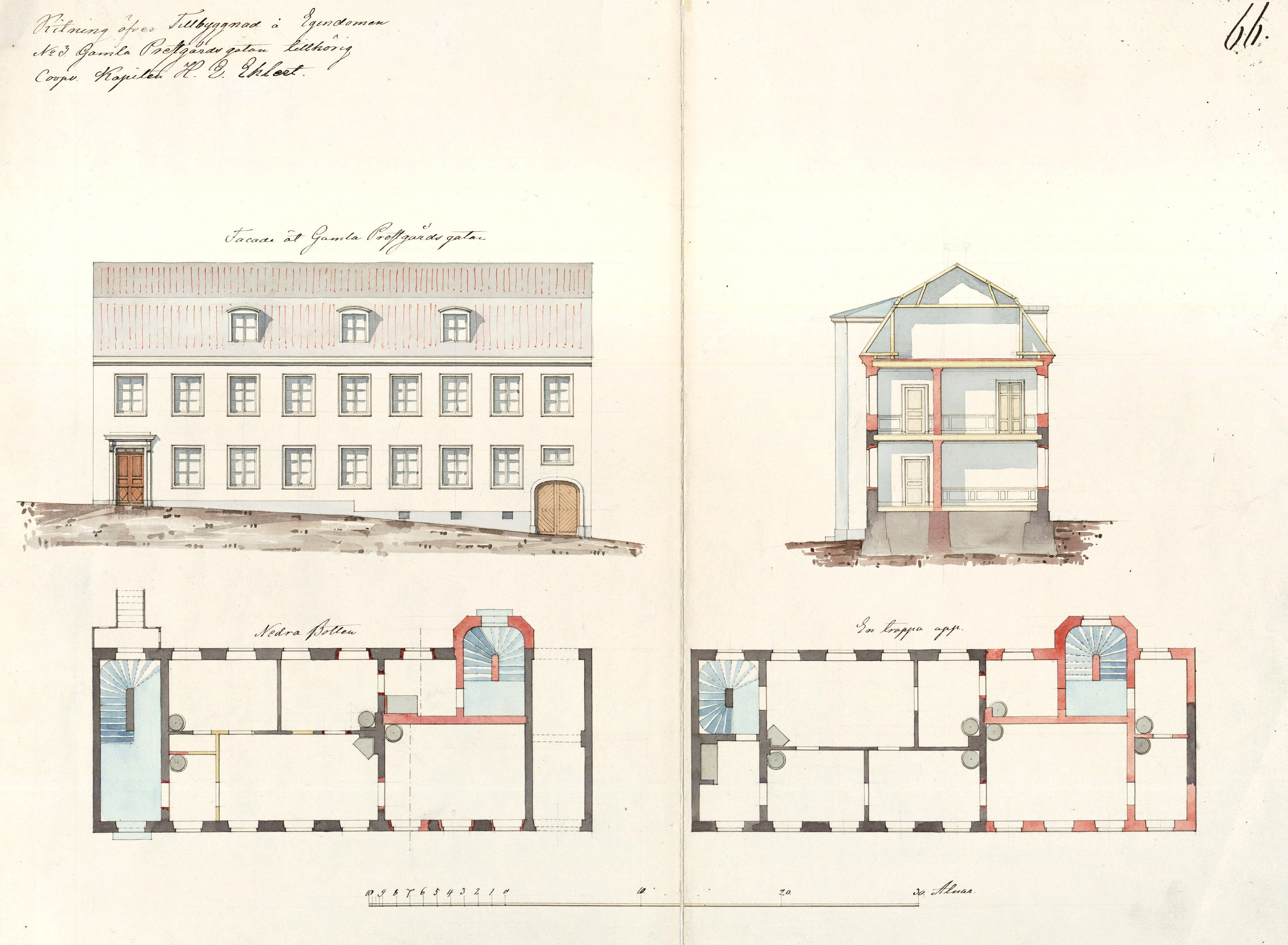 Ombyggnad av gathuset i fastigheten Nederland mindre 9